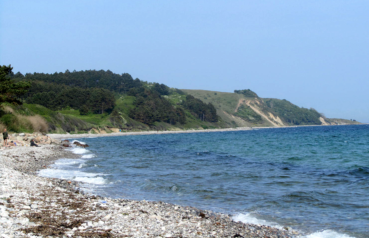 Bursklint nordøst for Sletterhage Fyr på den sydøstlige del af Helgenæs, Mols, Jylland Denmark. Lushage ses i horionten mod øst.